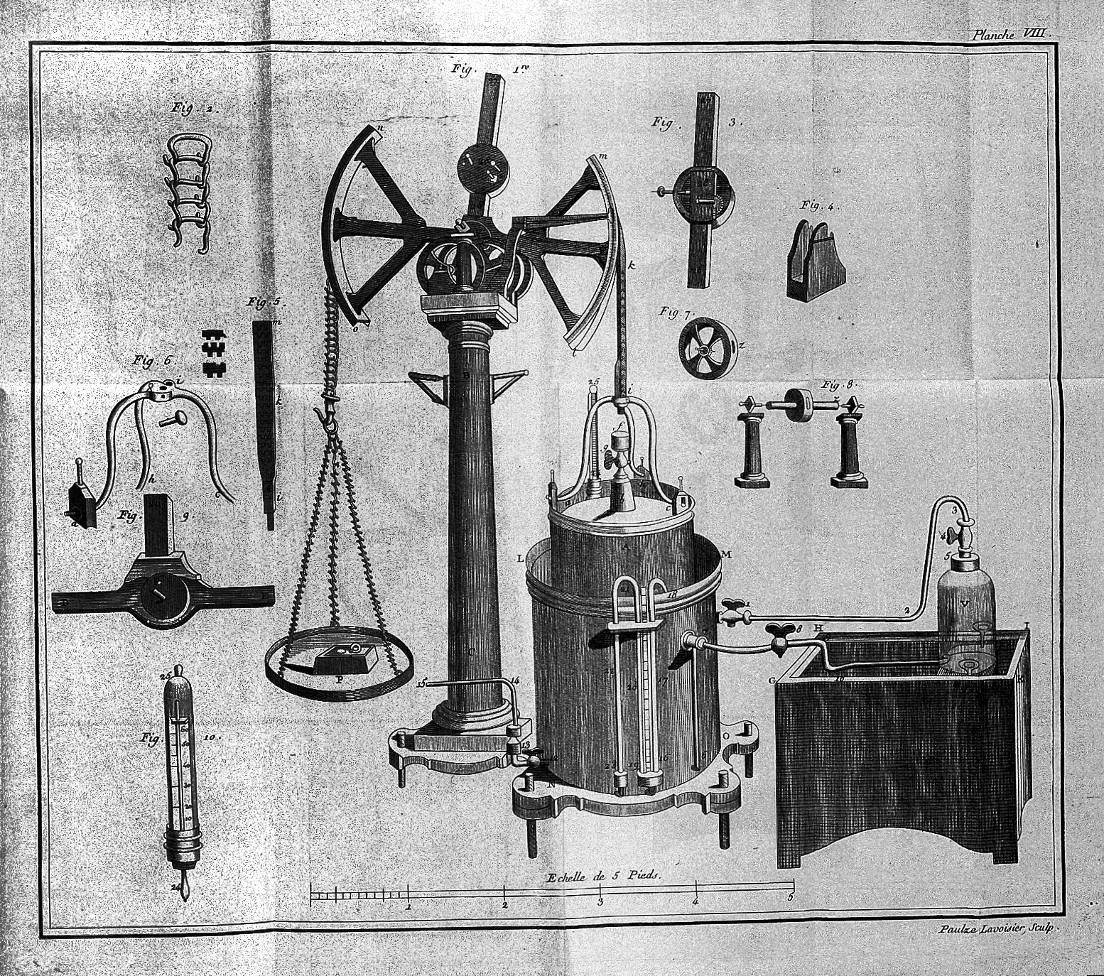 LAVOISIER, Antoine Laurent {1743-94} A.L. Lavoisier, Traite elementaire de chimie. Nouv. ed., a laquelle on a joint la Nomenclature ancienne et moderne...Paris: Cuchet, 1789. Vol. iii entitled 'Nomeclature chimique'. Plate VIII: Large gasometer Rare Books Keywords: Chemistry; epb 32468; nomenclature